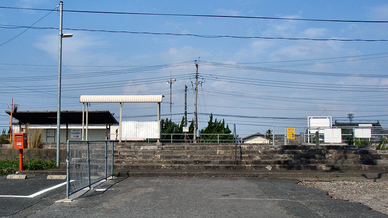 JR三角線住吉駅 駅舎跡 撮影者/著者/著作権保有者 : MK Products (本人がアップロード) 撮影日 : 2006/10/04 住吉駅_用にアップロードした画像です。良い画像があれば別の画像に変えてください。